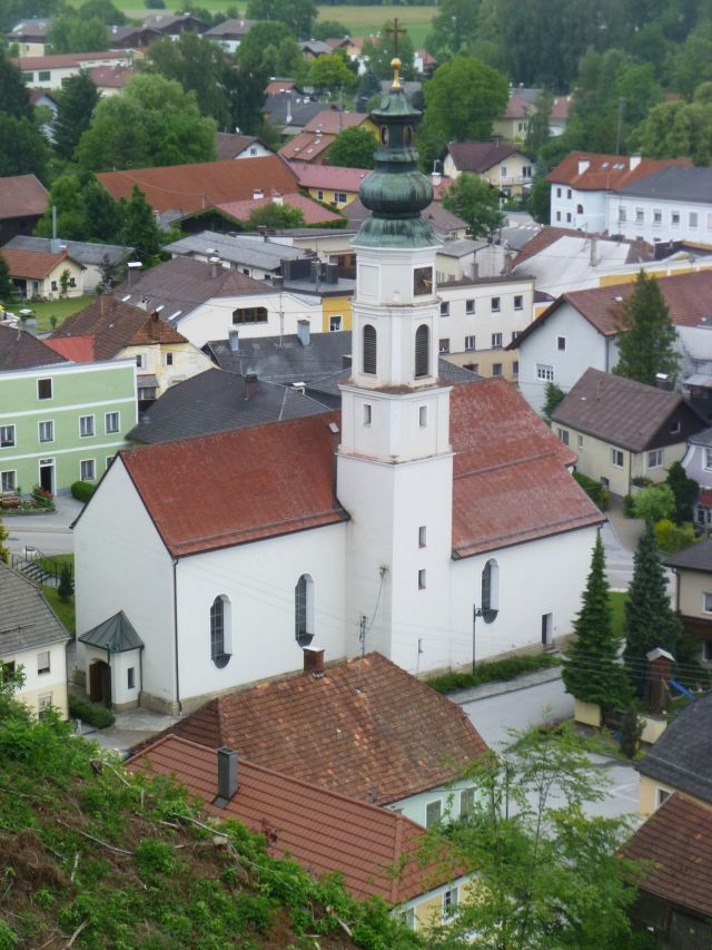 Kath. Pfarrkirche hll. Peter und Paul sowie ehem. Friedhof